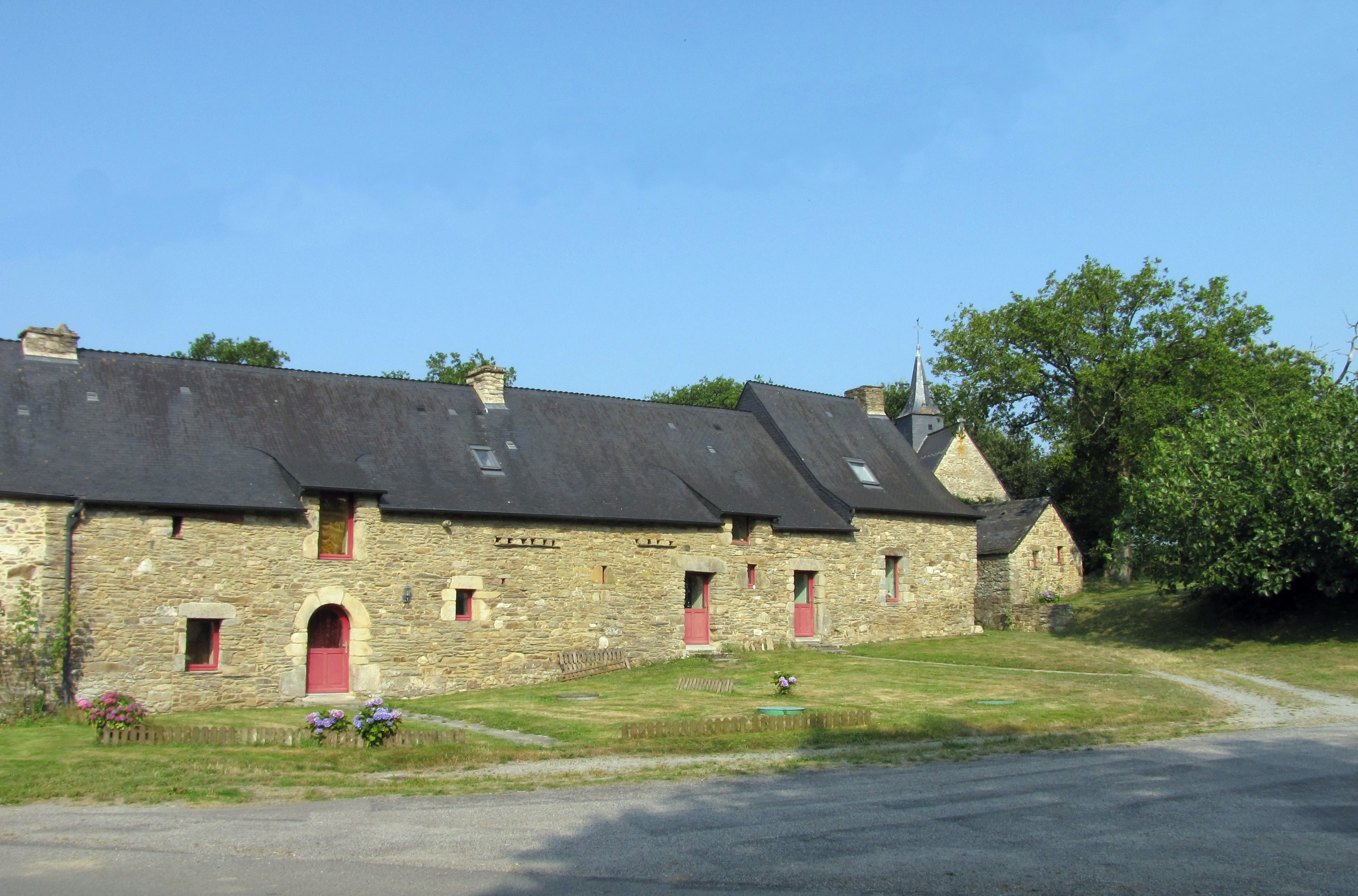 Longère située dans le village de Maubran commune de Peillac